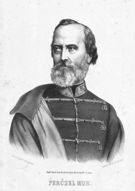 Perczel, Moritz (1811 - 1899)